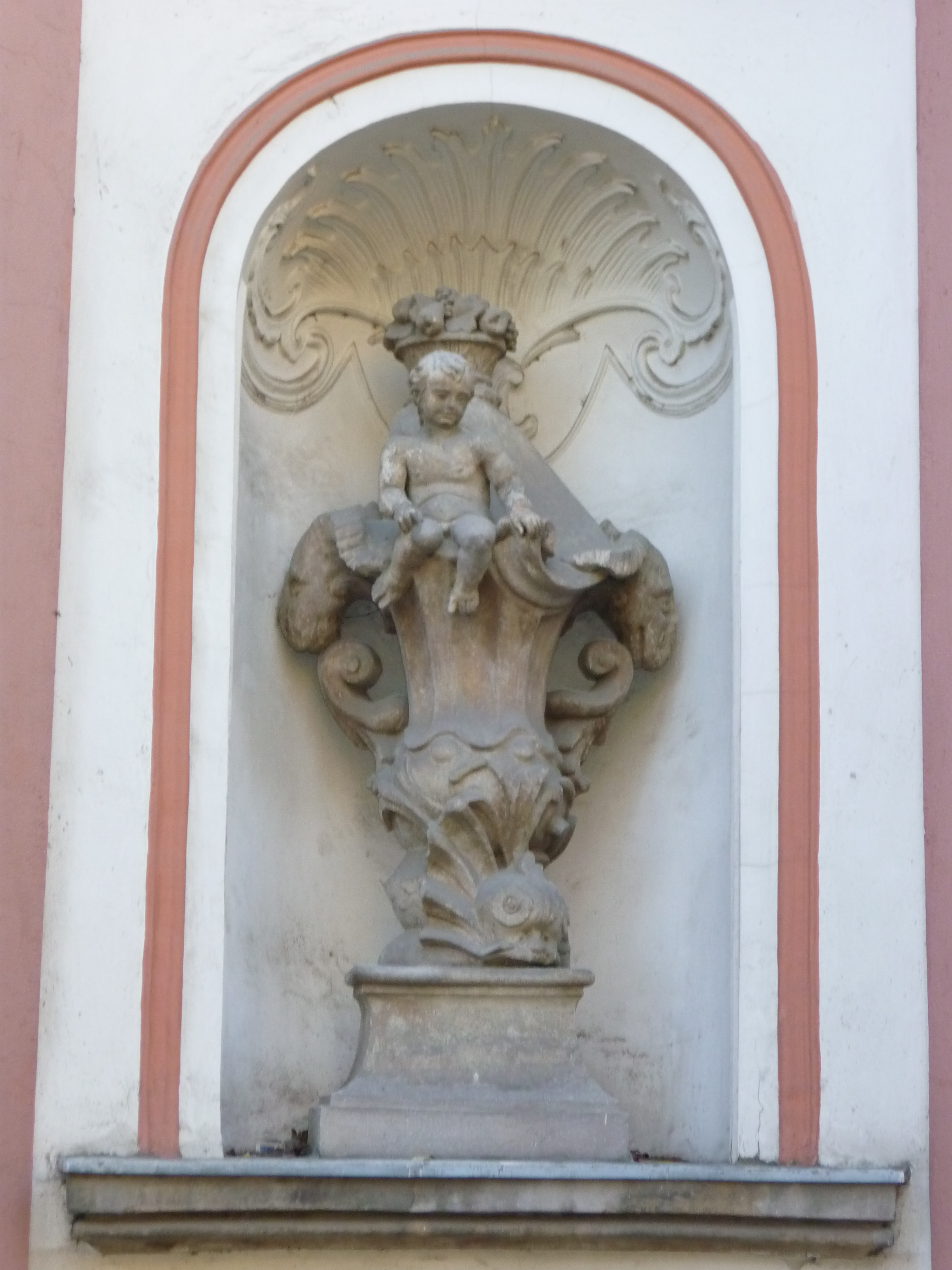 Puttóval díszített váza a kispréposti palota falán, Eger